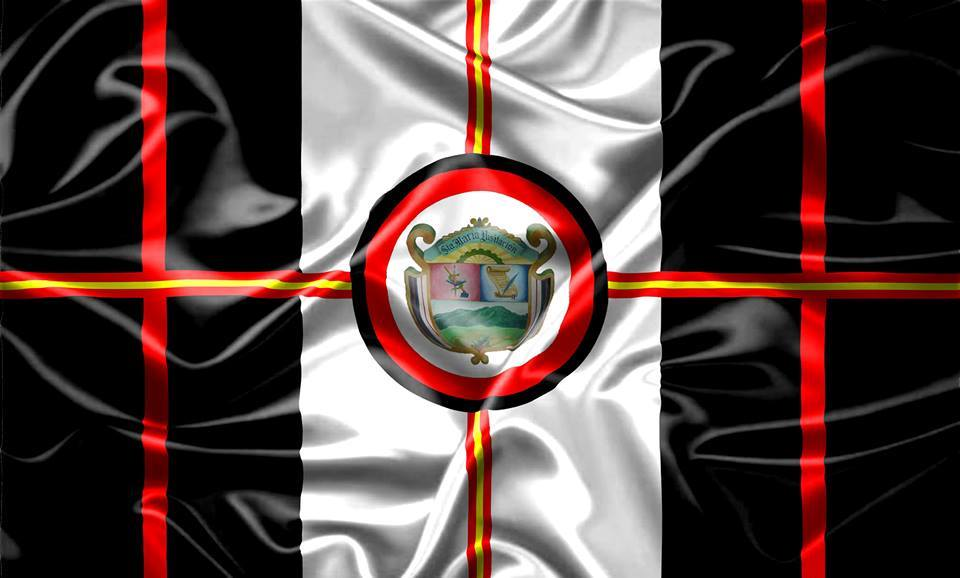 Santa María Visitación